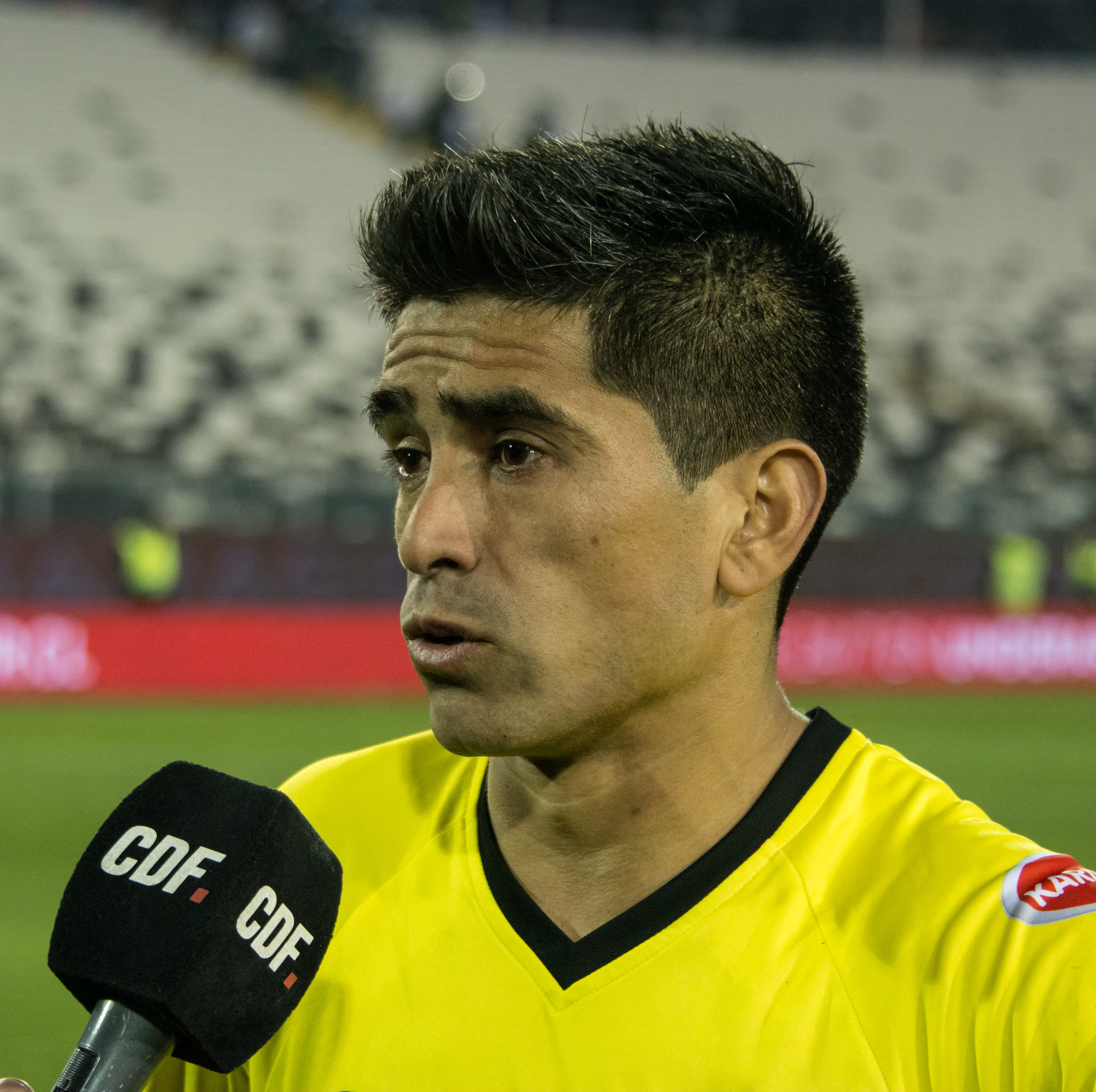 Braulio Leal, Colo-Colo v San Luis, Estadio Monumental, Macul, Santiago, Chile.